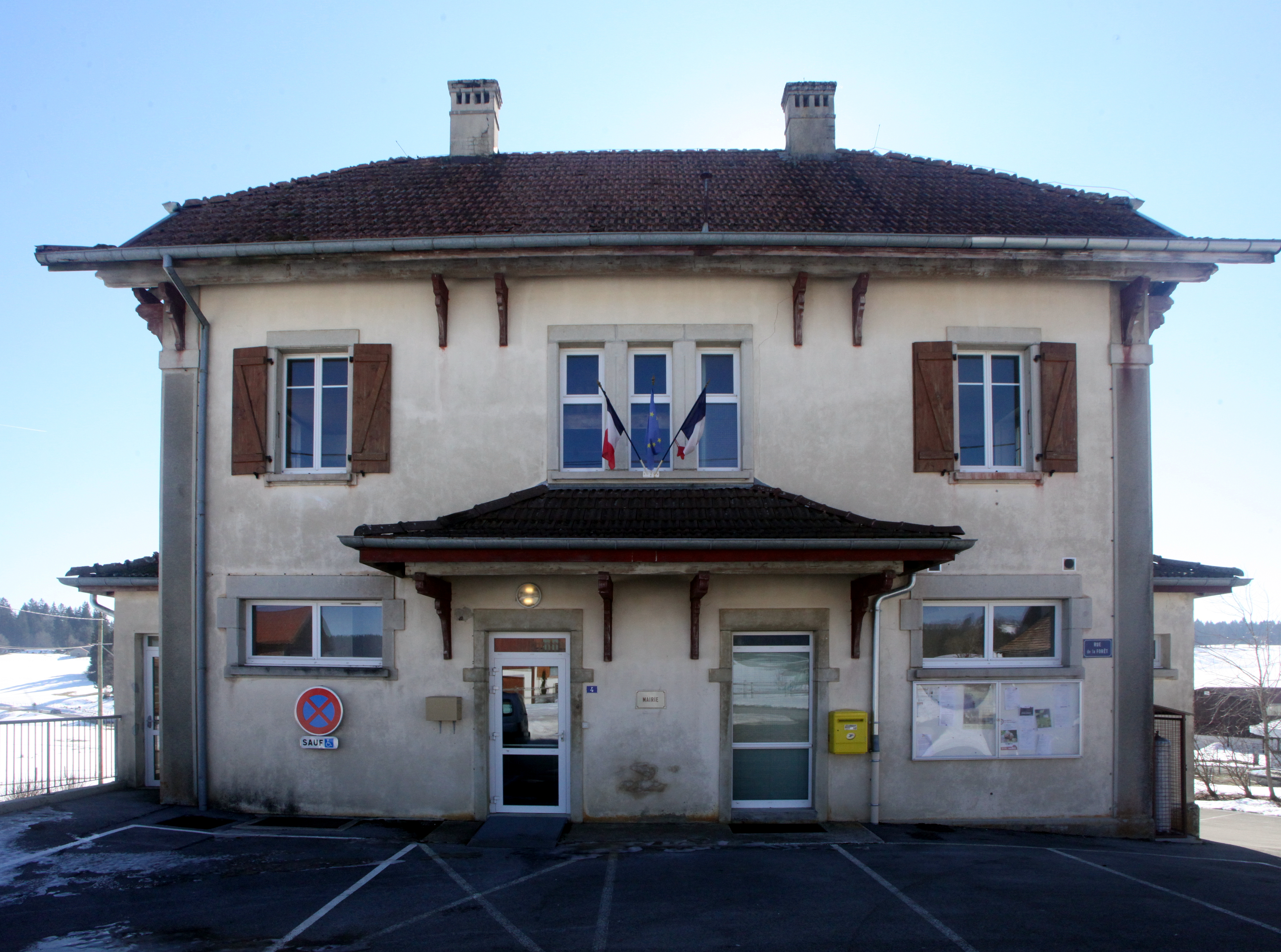 Mairie de Narbief.